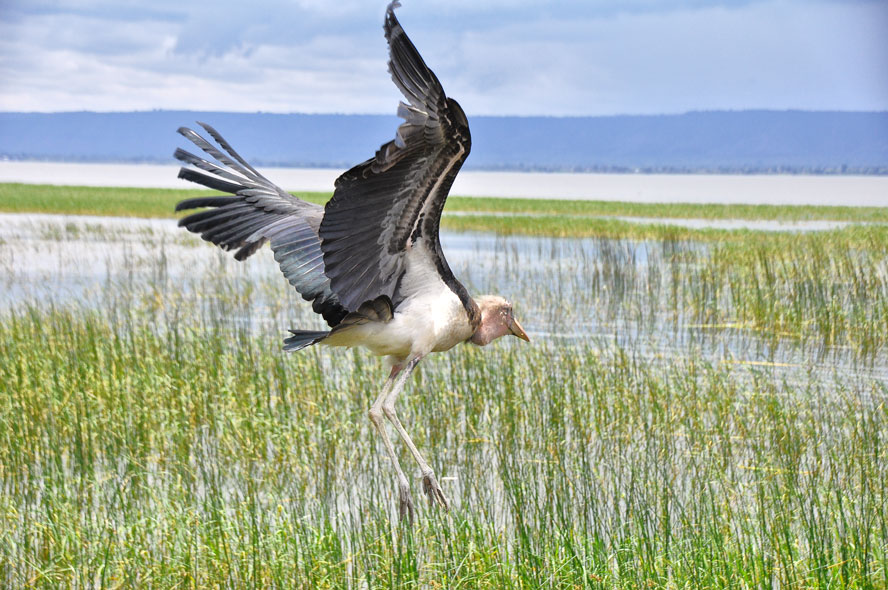 Lake Hawassa